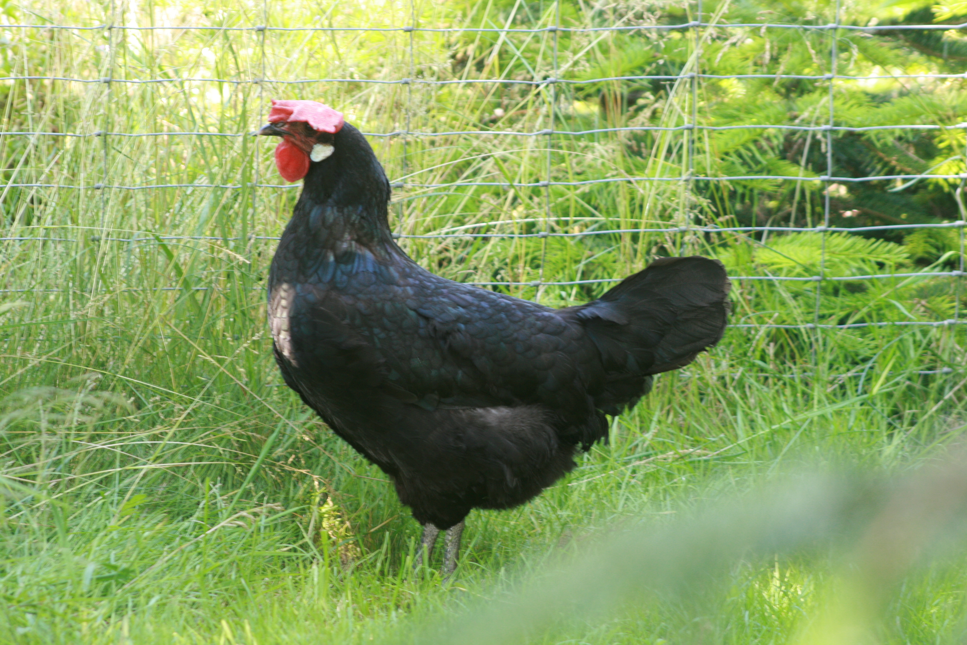 Bergischer Schlotterkamm (Henne)